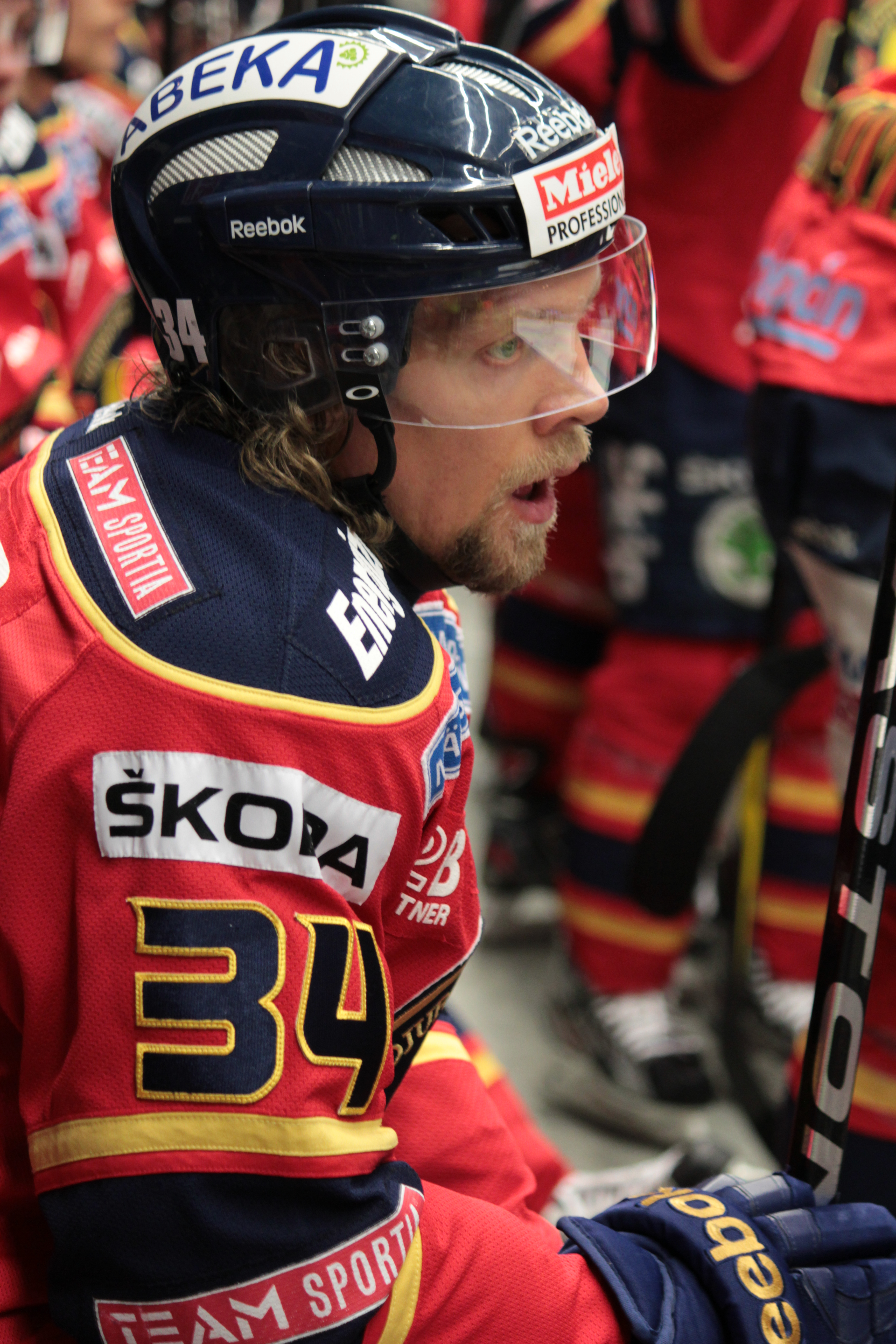 Daniel Tjärnqvist i kvalmatchen mellan Leksands IF och Djurgårdens IF i Leksand 2012-03-31